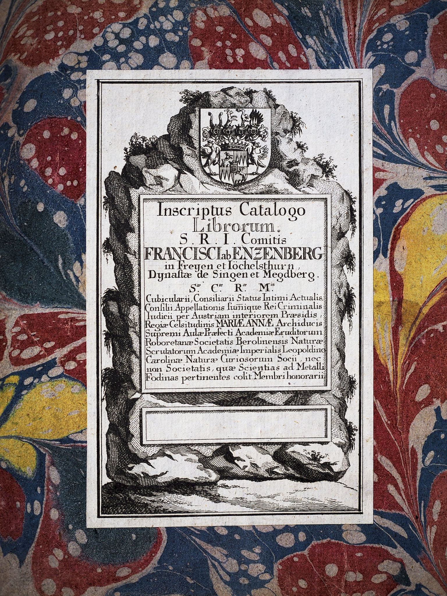 Exlibris von Franz Josef von Enzenberg (1747 - 1821) aus dem Buch "Dactyliothec, das ist Sammlung geschnittener Steine der Alten aus denen vornehmsten Museis in Europa ... in zwey tausend Abdrücken ediret" / von Philipp Daniel Lippert. Leipzig, 1767. Exemplar der Wissenschaftlichen Stadtbibliothek Mainz. Signatur: 767 / 8.